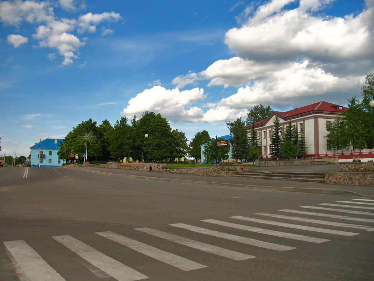 Беларуская (тарашкевіца): Докшыцы